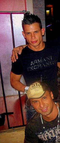 Brent e Steven Pena